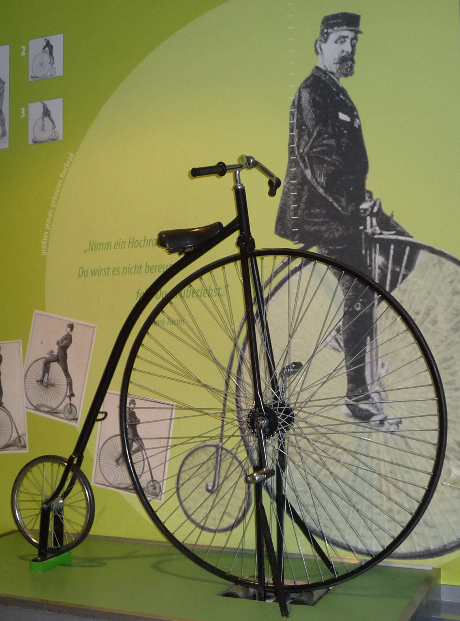 Deutsches Zweirad- und NSU-Museum